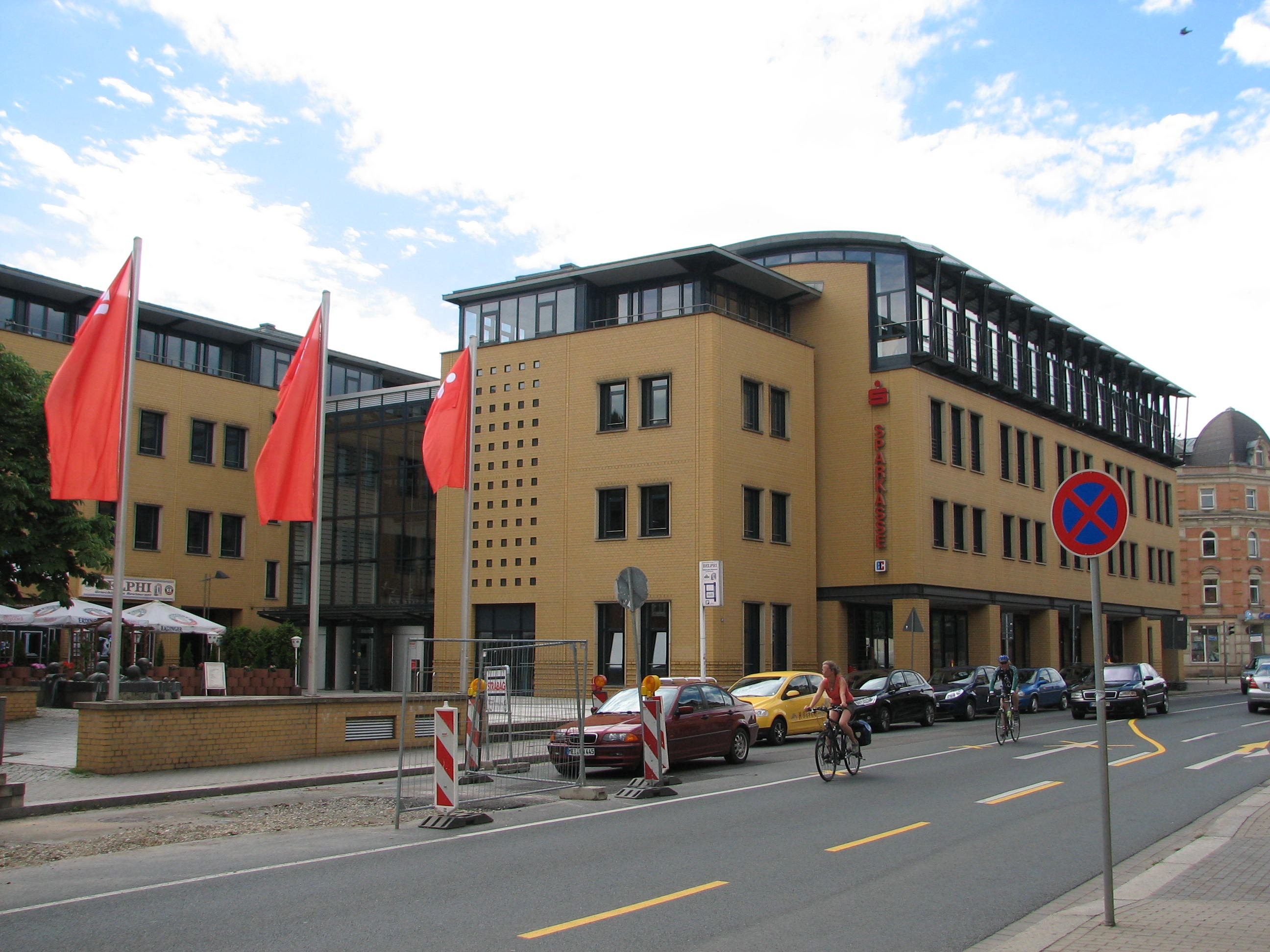 Das Gebäude der Sparkasse an der Dresdner Straße in Freital-Potschappel.